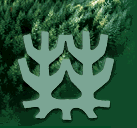 Изображение взято с айта для информирования населения.